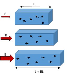 Plus le champ magnétique qui s'exercce sur le matériau est puissant, plus les spins des électrons s'alignent